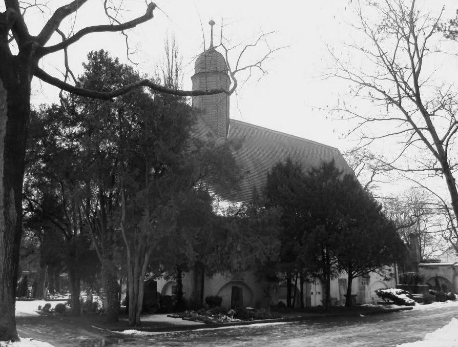 Merseburg, Kapelle auf dem Stadtfriedhof St. Maximi